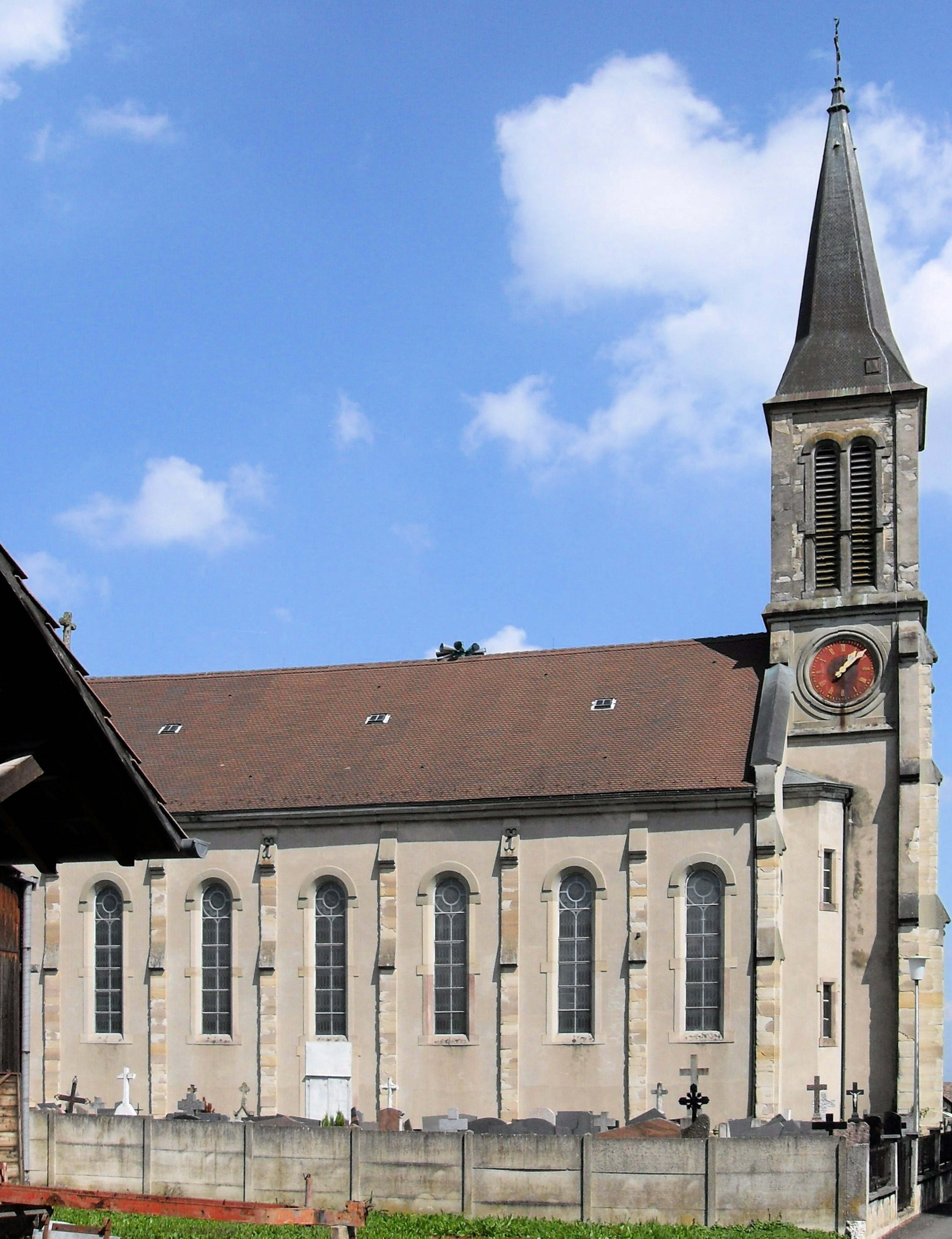 L'eglise Saint-Pierre et Saint-Paul à Hagenthal-le-Bas